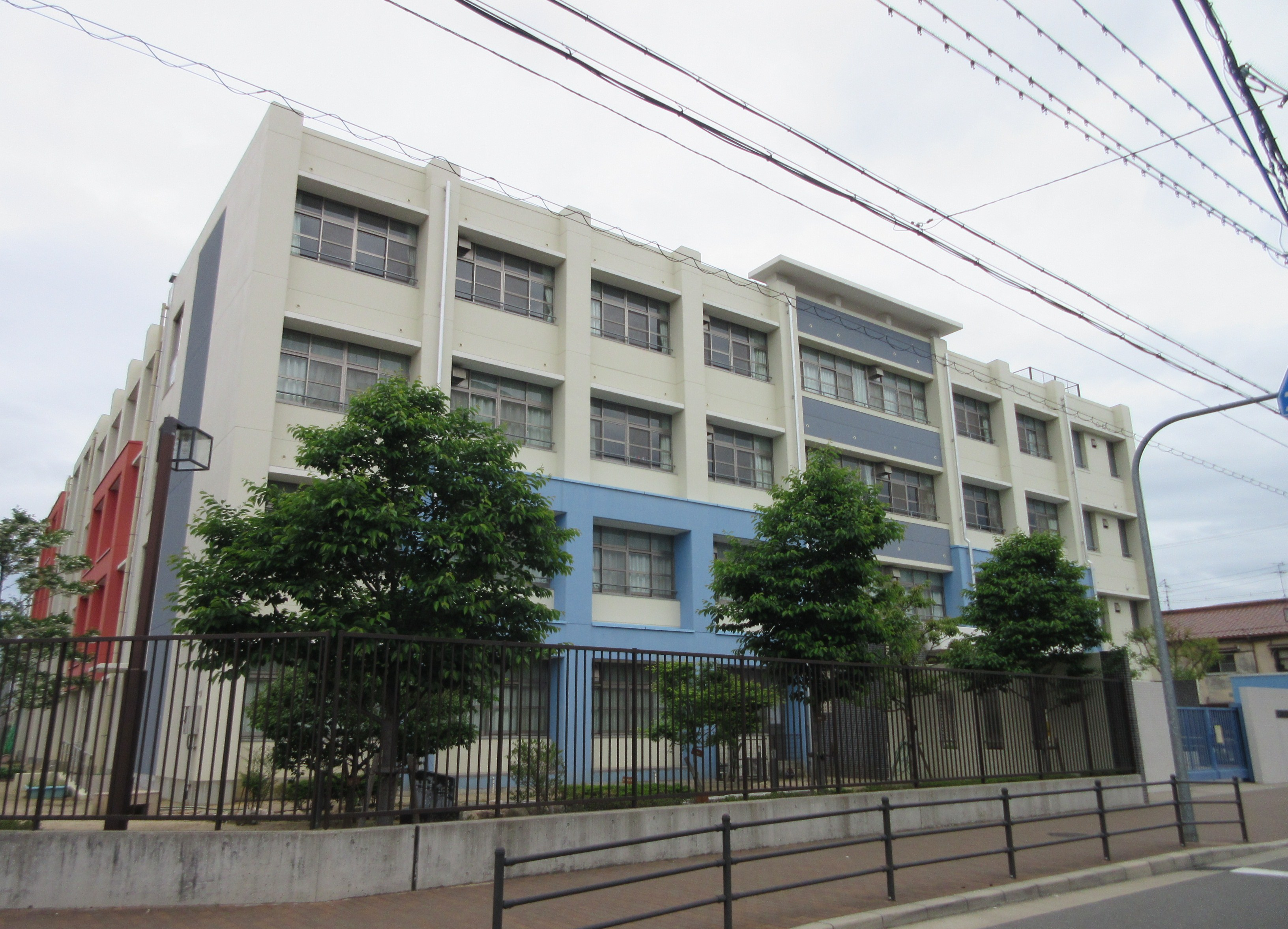 大阪市立焼野小学校